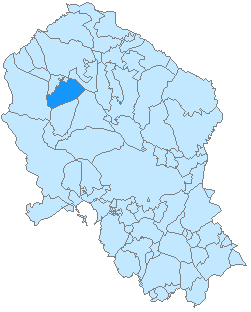 Mapa de Bélmez en la provincia de Córdoba, Andalucía, España.